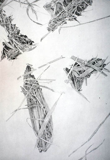 OE Nr.130-15: Ohne Titel, 2004, Bleistift auf Leinwand, 130 x 95 cm Sammlung Tiroler Landesmuseum Ferdinandeum, Innsbruch